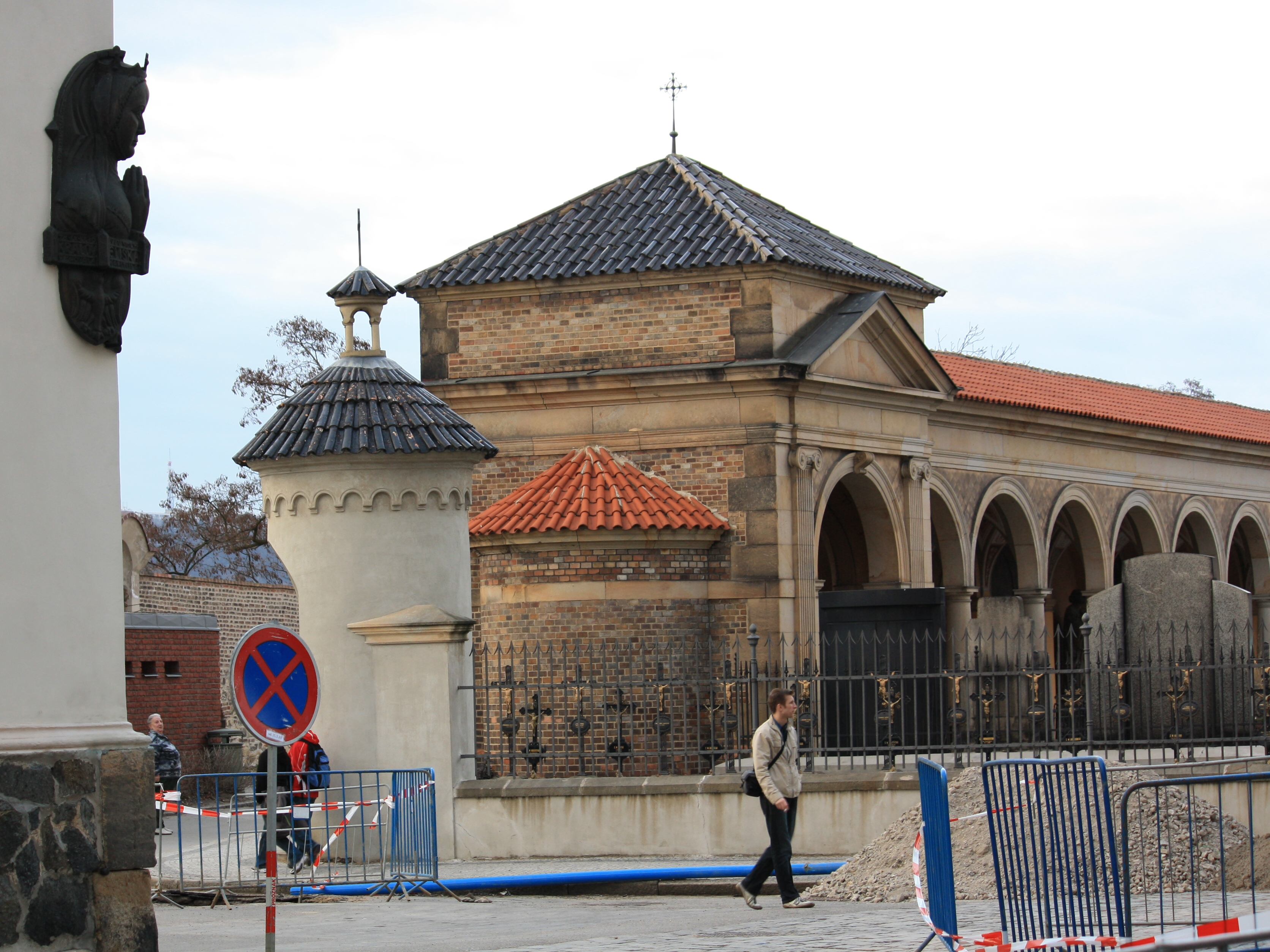 Praha, Vyšehrad